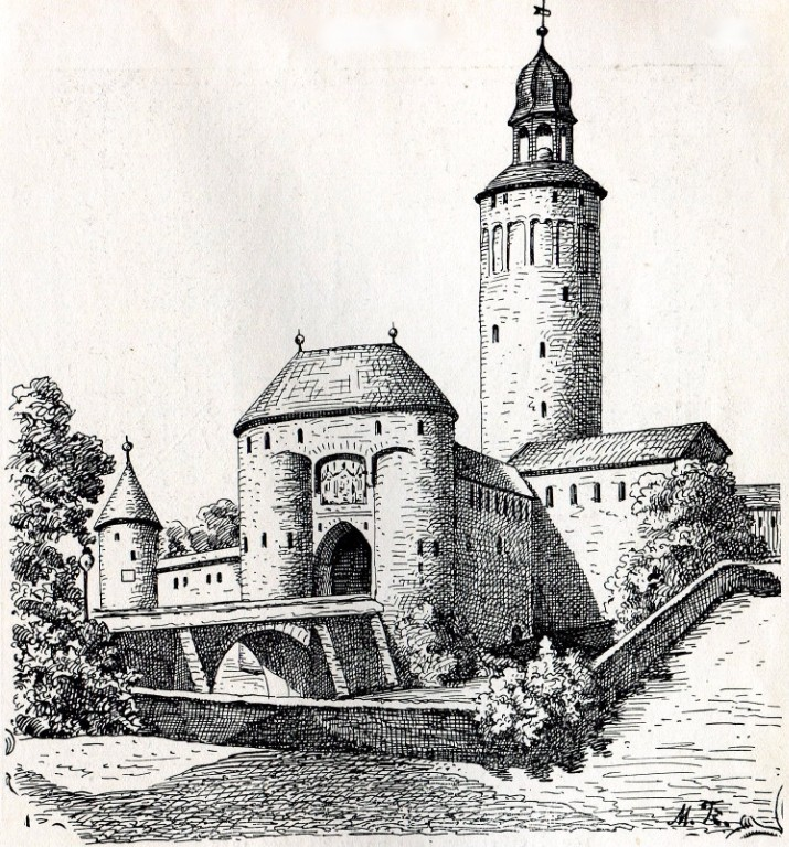 Frauentor Görlitz